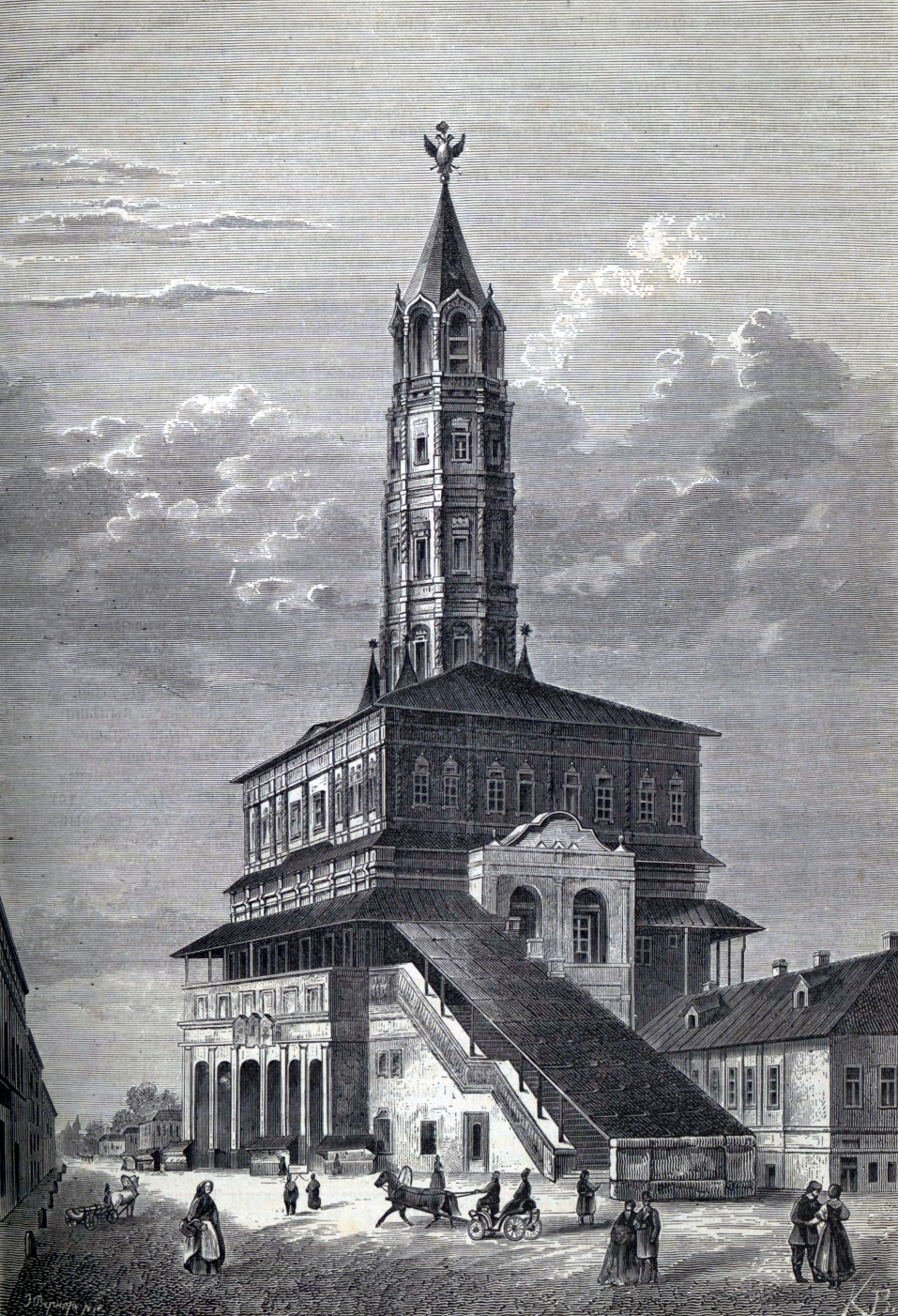 Сухарева башня в Москве